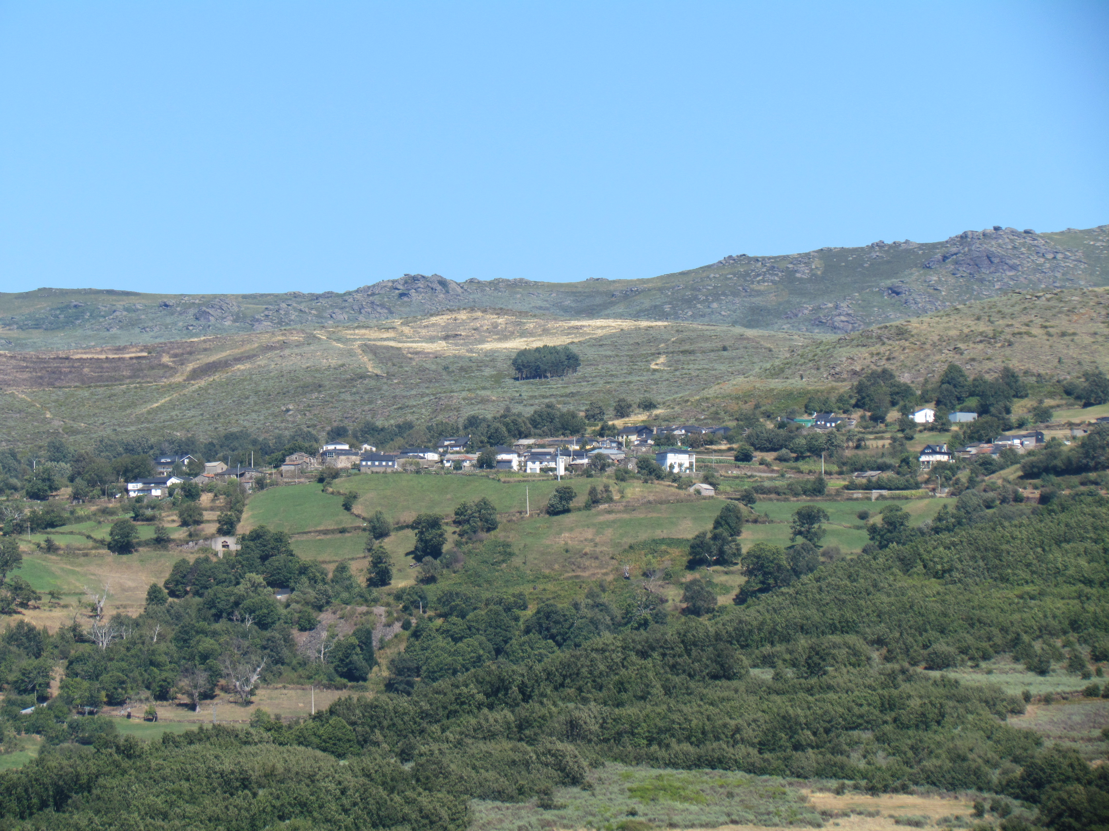 Vista de Rubiais